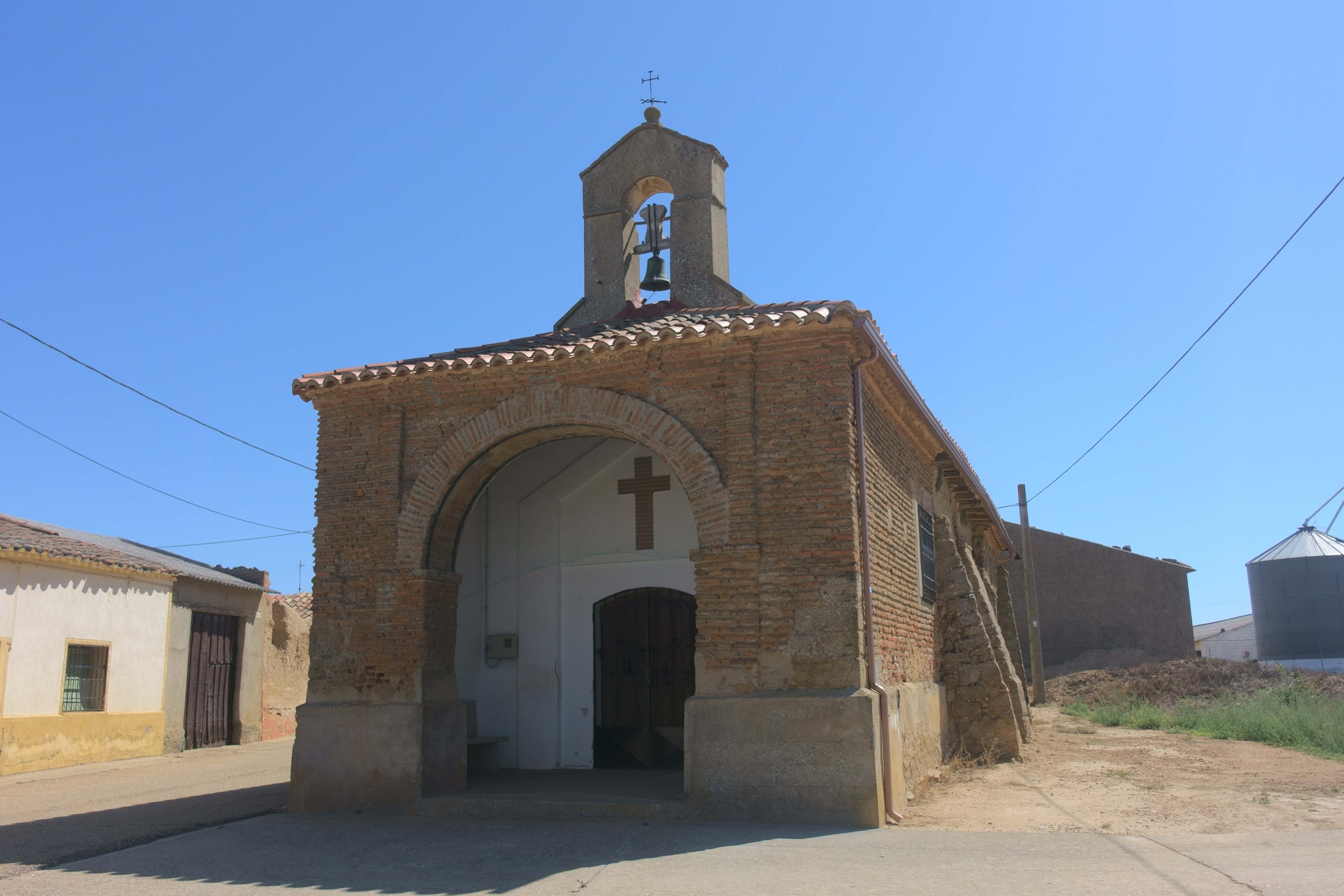 Ermita del Cristo de la Luz, Quintanilla del Olmo (Zamora, España).